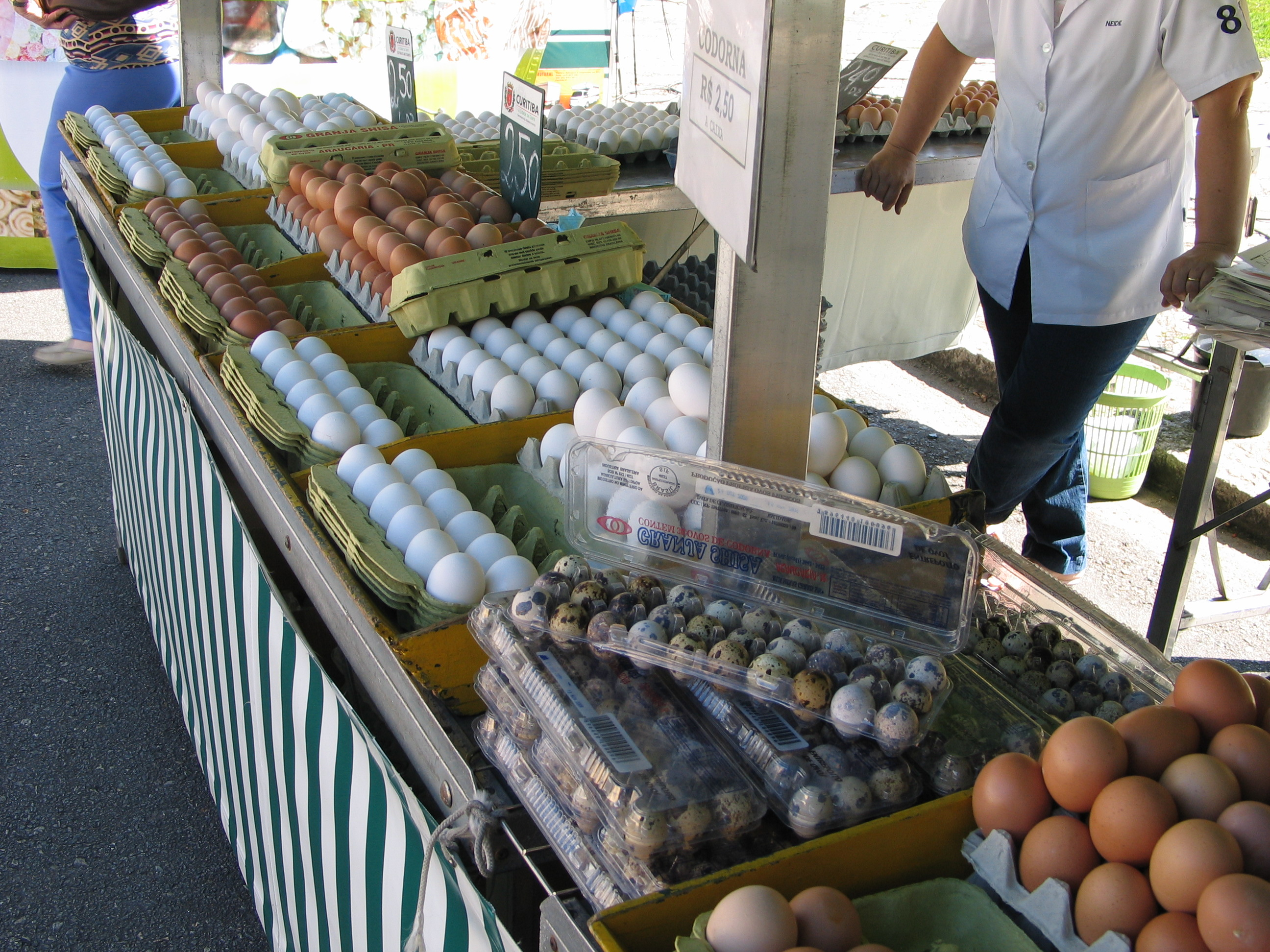 צולם בעיר קוריטיבה,ברזיל ,דוכן ביצים בשוק